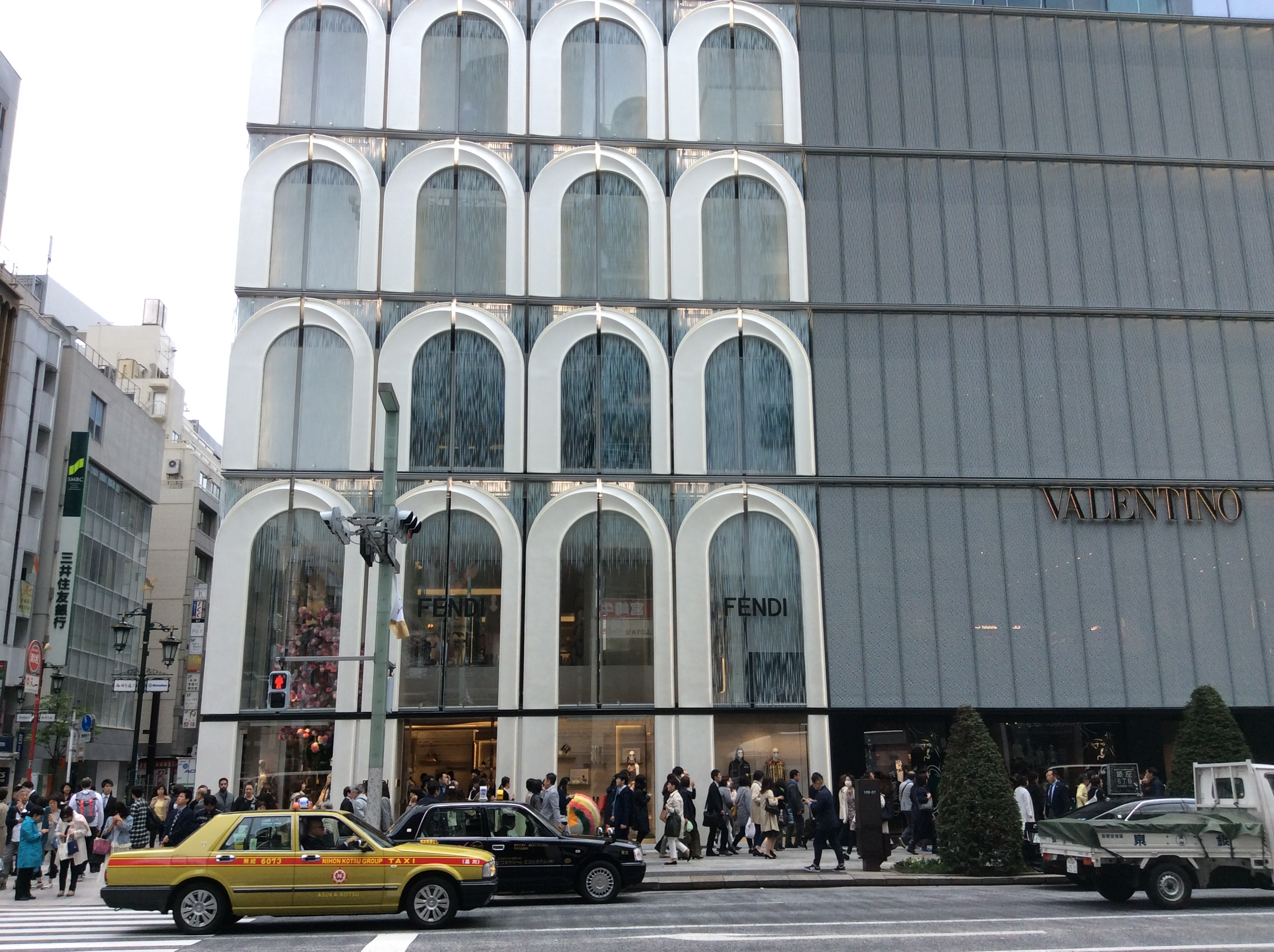 GINZA SIX